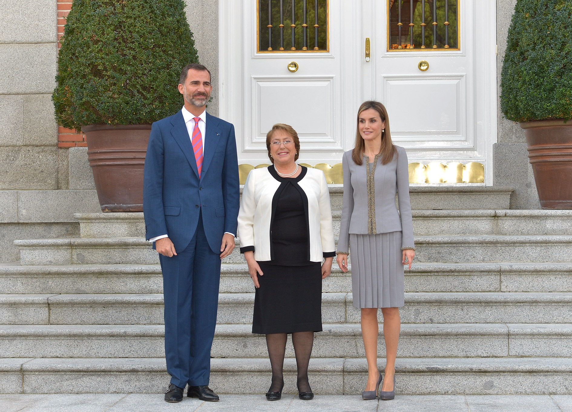 Presidenta Bachelet se reunió con Su Majestad el Rey de España Felipe VI